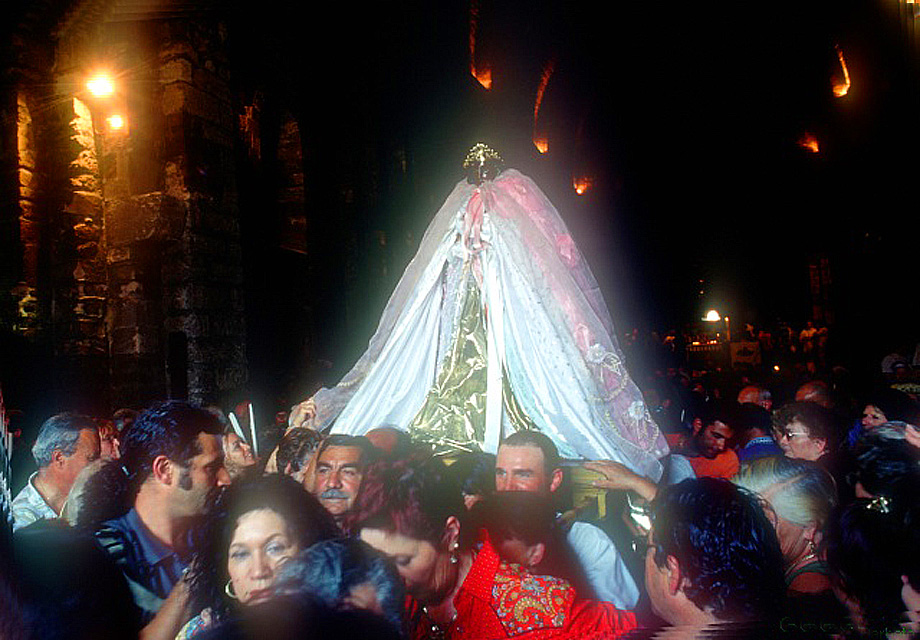 Sortie de Sarah la Noire lors du pèlerinage gitan aux Saintes-Maries-de-la-Mer